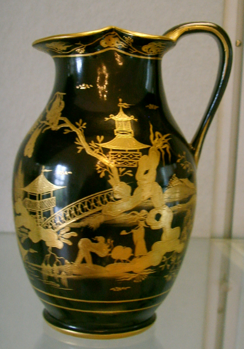 Museo delle porcellane di Firenze, porcellane viennesi a cineserie, 1799